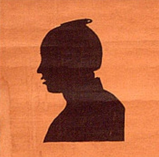 前田直良の肖像。